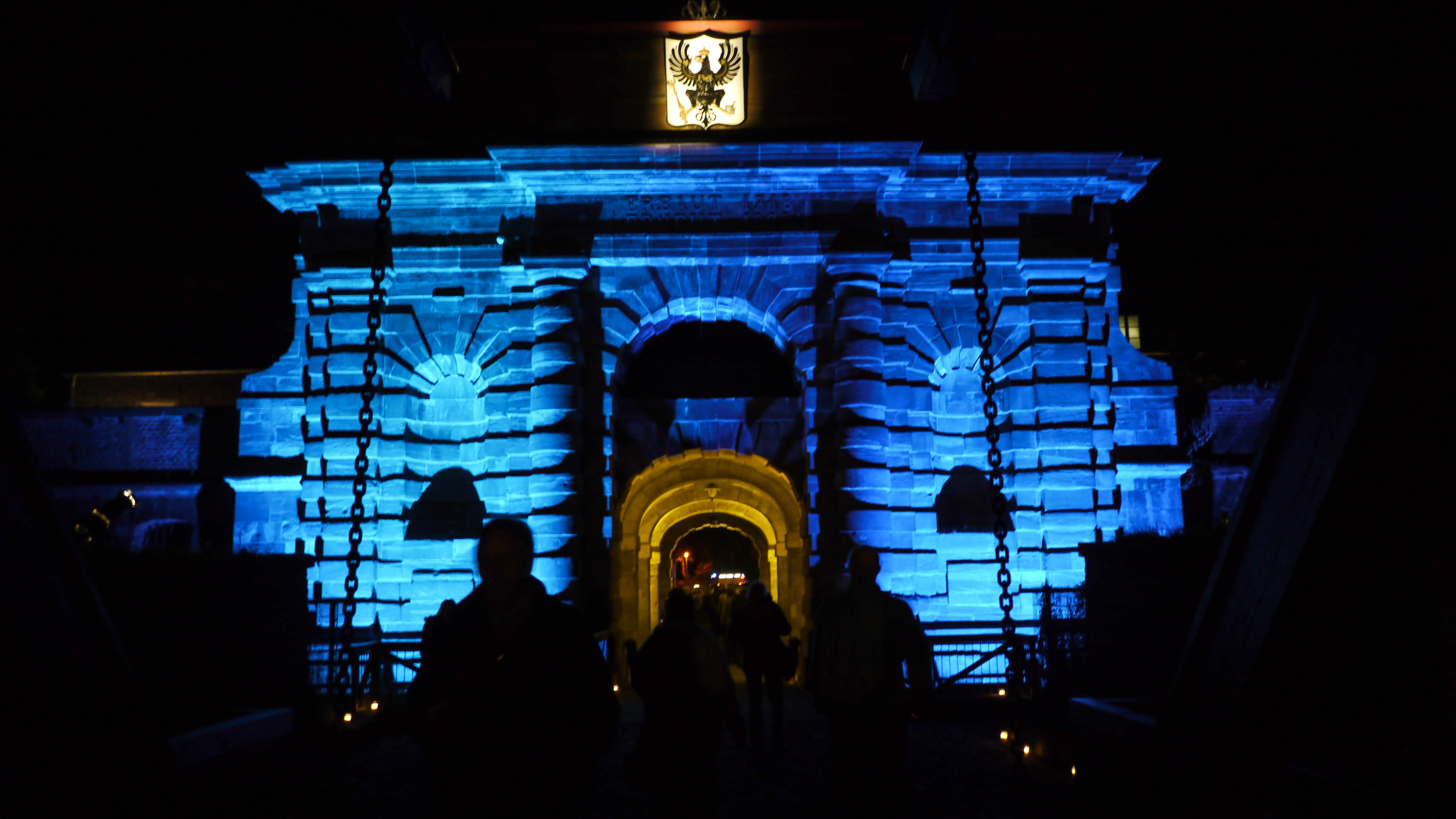 Haupttorgebäude Zitadelle Wesel bei Nacht StadtseiteThis is a photograph of an architectural monument., no. 3